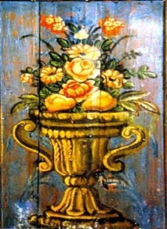 Διακοσμητικό θέμα με δοχείο με άνθη σε θωράκιο του τέμπλου, 19ος αι., Άγιος Νικόλαος, χωριό Πέτερσκο, Φλώρινα